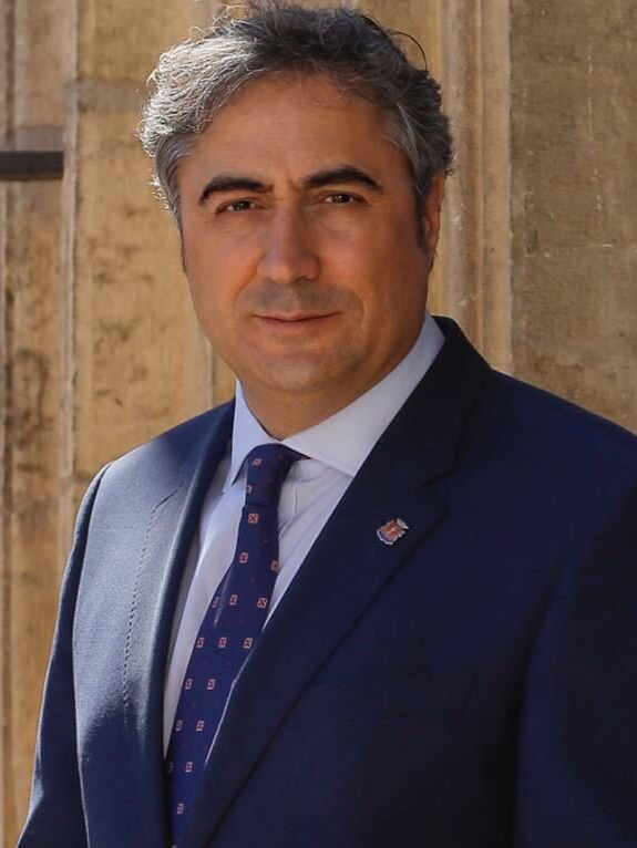 Ángel Mariscal Estrada, alcalde de Cuenca